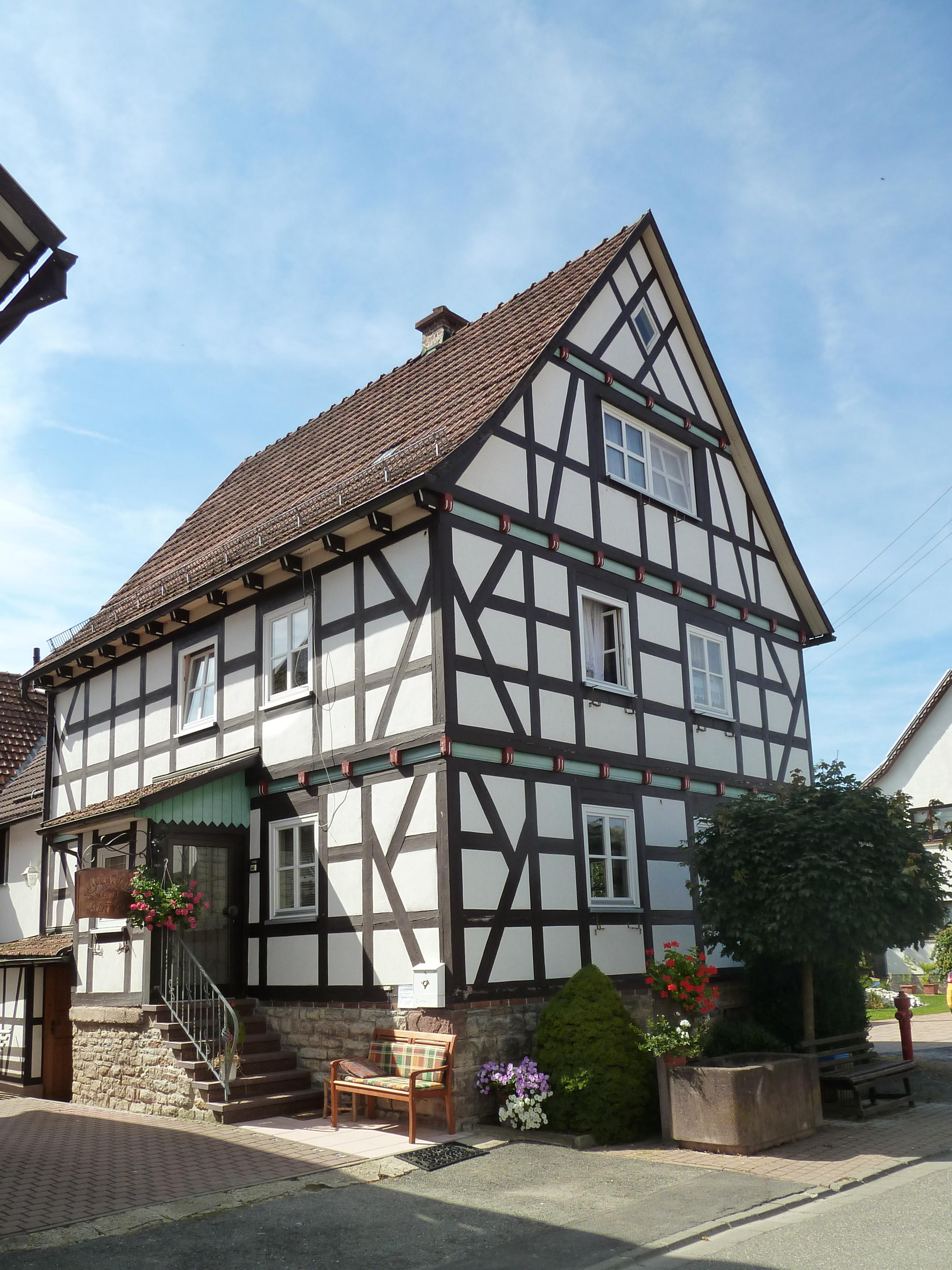 Wohnhaus Herrengasse 87 in Bachfeld im Landkreis Sonneberg